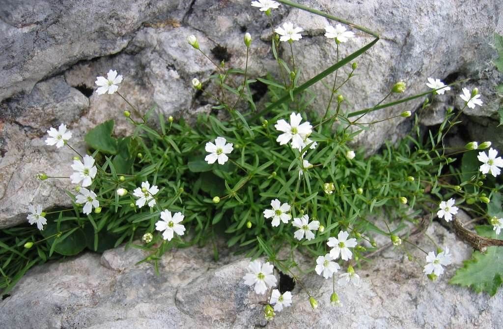 Kleiner Strahlensame (Silene pusilla) Fundort: Dachsteinplateau, Österreich